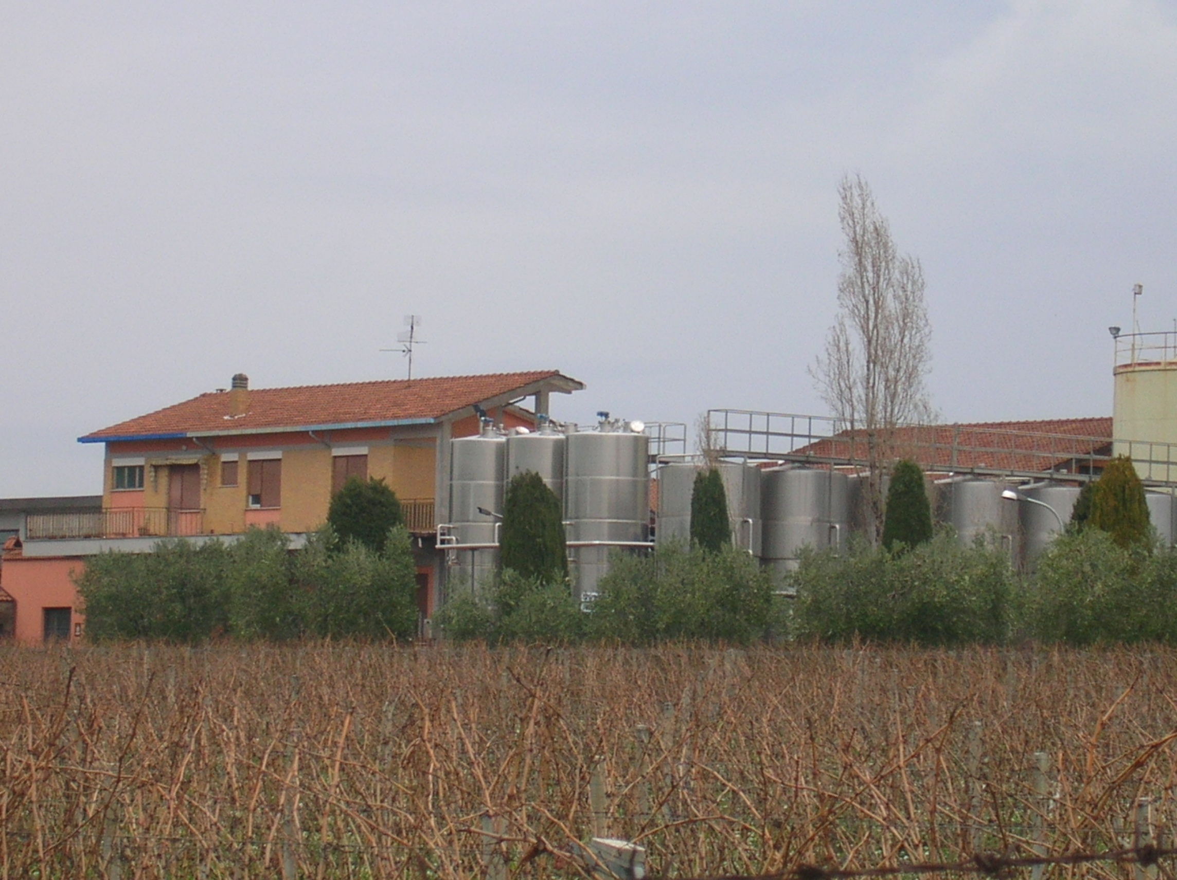 Cantina Villa Franca, wine production, located in Cecchina di Albano Laziale (Roma)- Italy